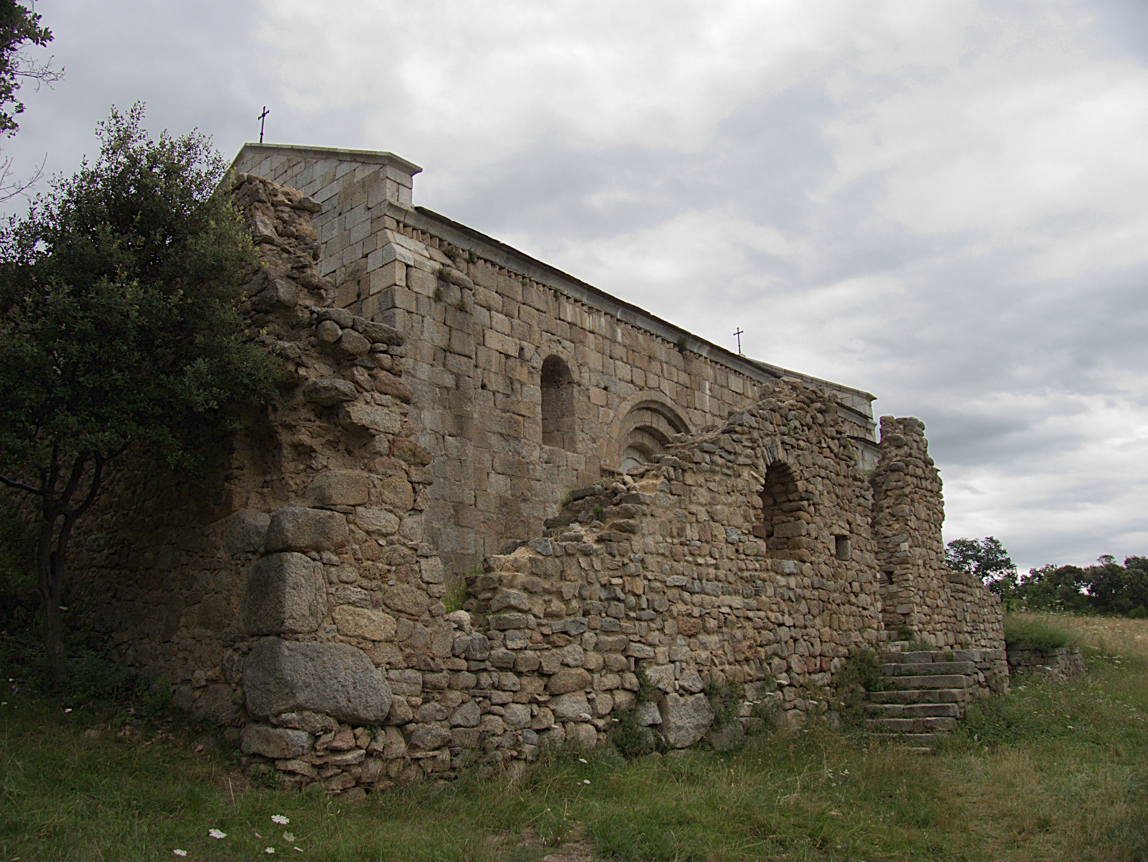 Vue de la façade sud, ancienne église Saint Martin (12e siècle), Corsavy (Pyrénées-Orientales, Languedoc-Roussillon, France)